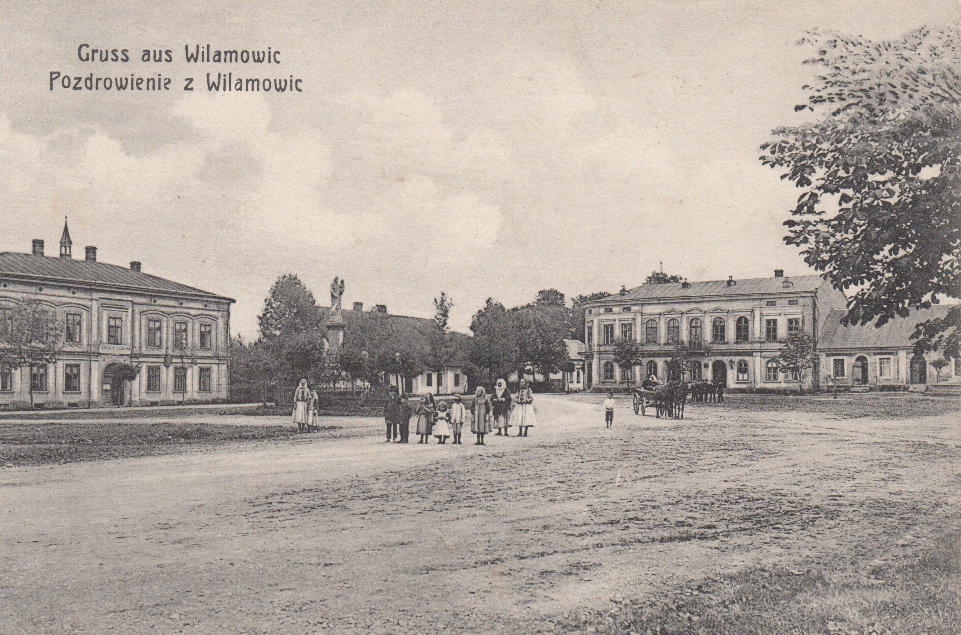 Wilamowice rynek ok. 1915